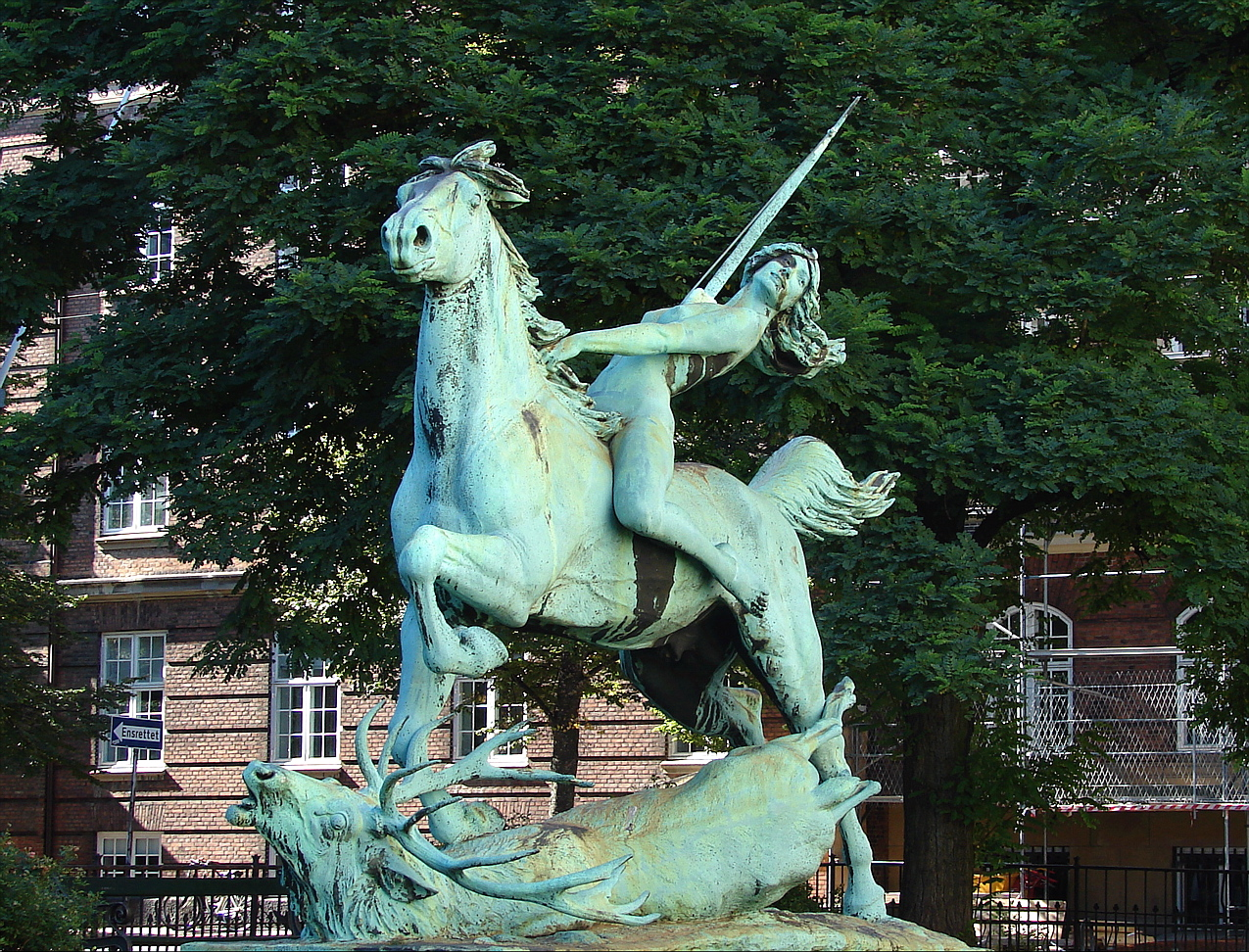 Diana til Hest, København, Carl J. Bonnesen